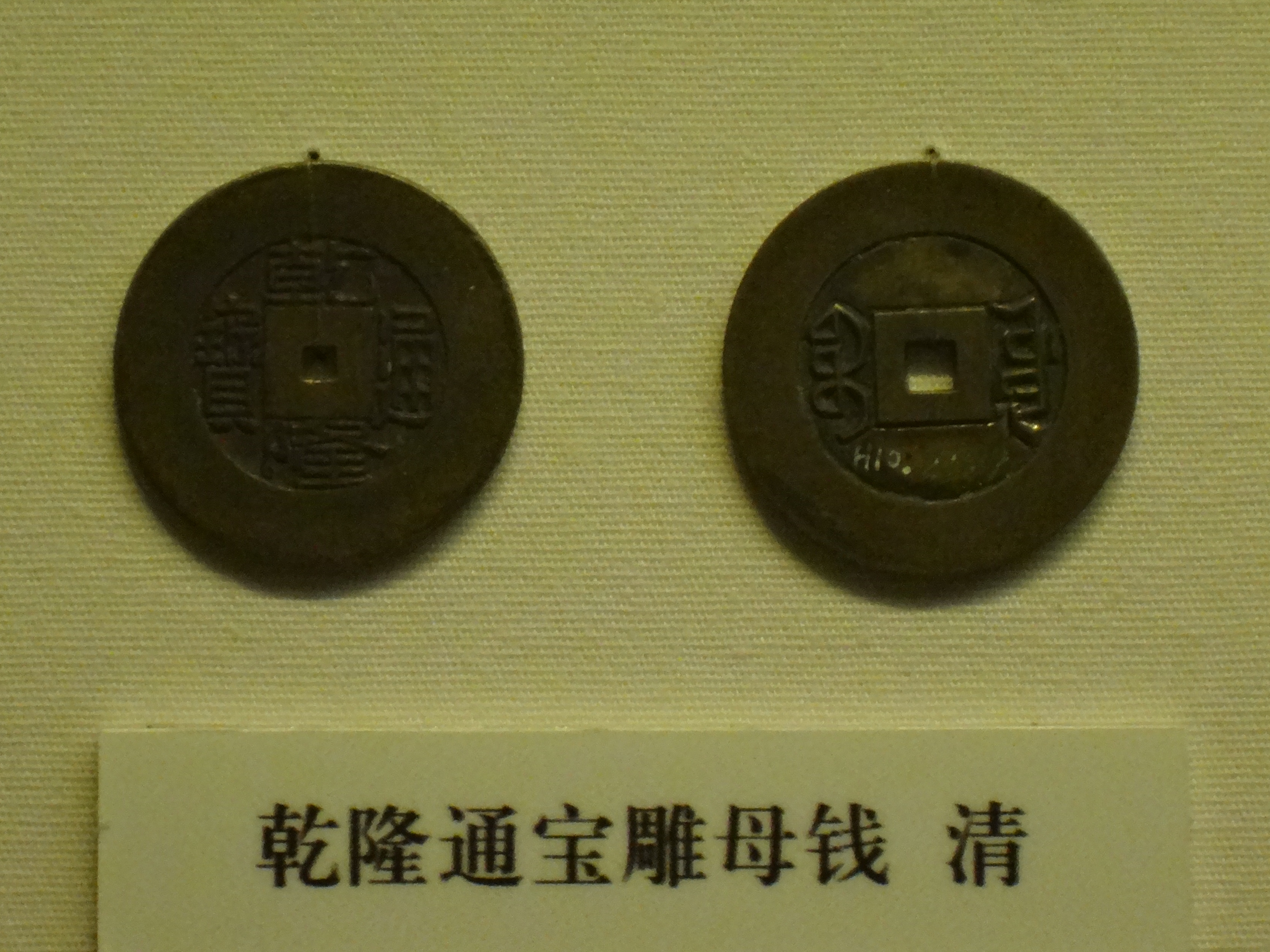 清代乾隆通宝雕母钱，拍摄于中国国家博物馆